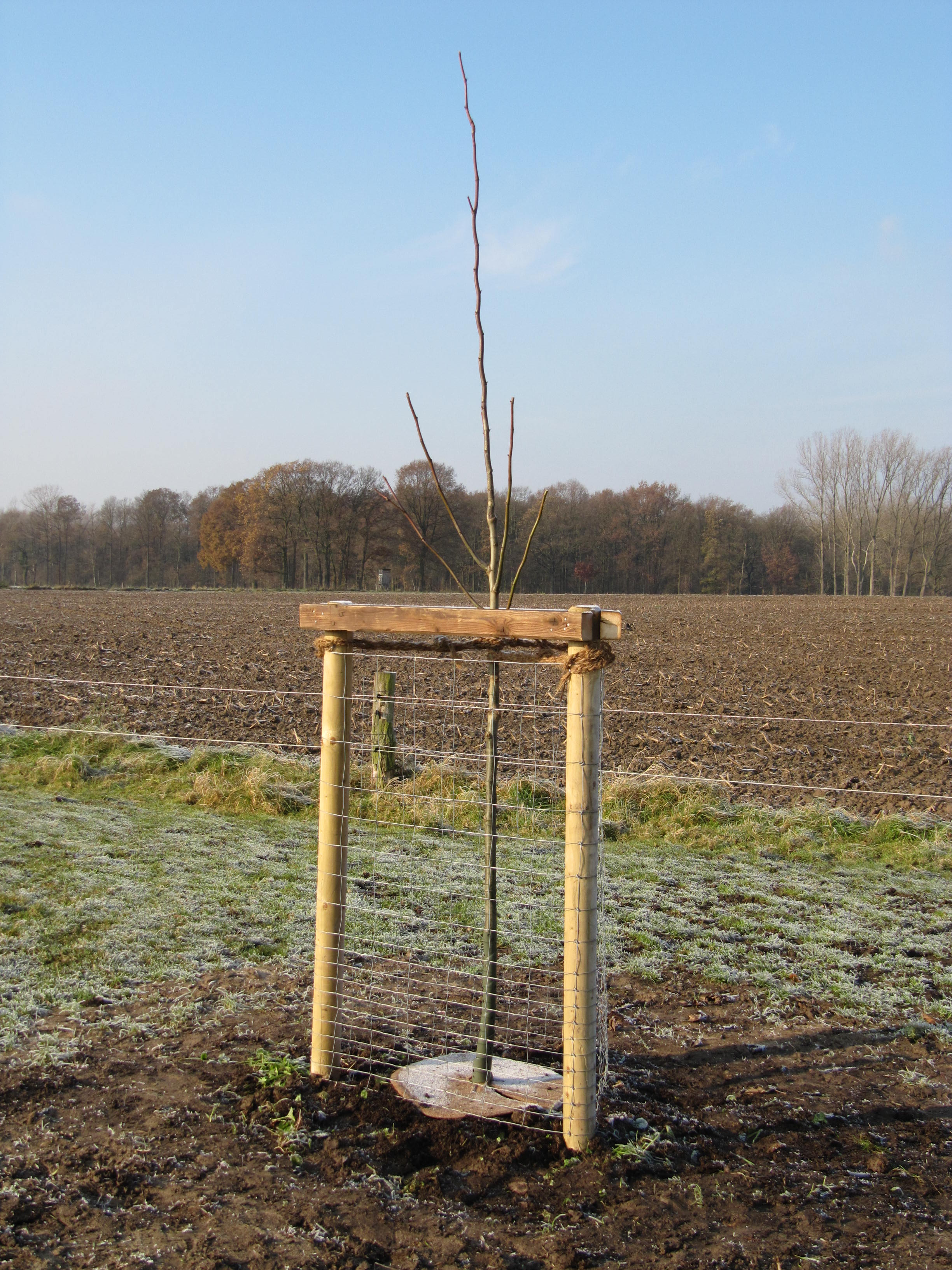 Linde, frisch gepflanzt, mit Umzäunung als Verbissschutz gegen Weidetiere und zur Fixation des Baumes, Kunststoffspirale am Stamm zum Schutz vor Verbiss durch Hasen oder Kaninchen sowie Kokosvlies als Abdeckung der Baumscheibe zur Unkrautunterdrückung und Minderung der Verdunstung. Der Baum ist mit Kokosstrick angebunden; da dieser im Laufe der Jahre verrottet, besteht keine Gefahr des Einschnürens des Stammes, falls die Entfernung vergessen werden sollte.